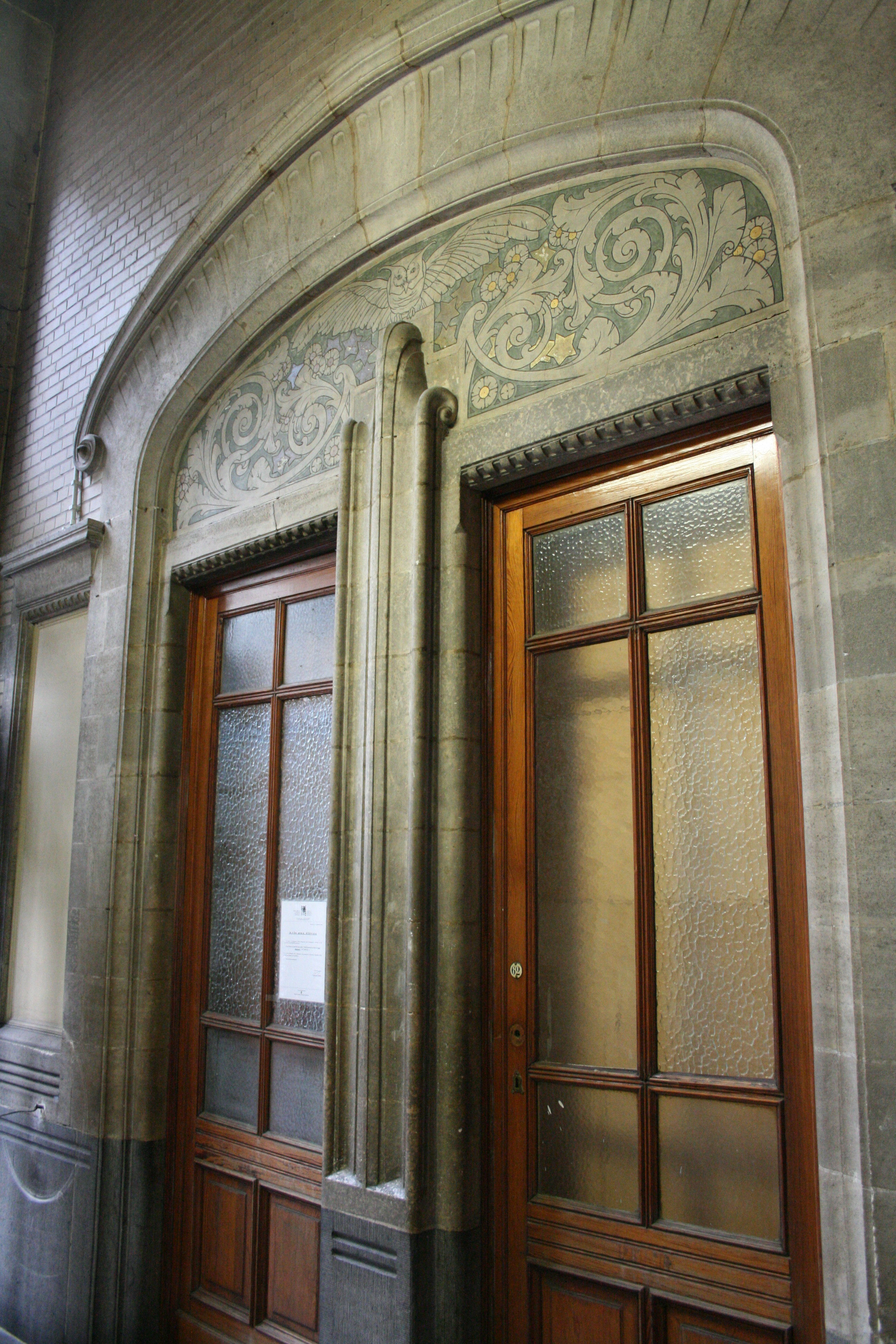 Institut Diderot, rue des Capucins 58, Bruxelles (Belgique). Ancienne école normale Emile André (1902). Architecte: Henri Jacobs. Hall d'entrée: sgraffite de Privat Livemont.